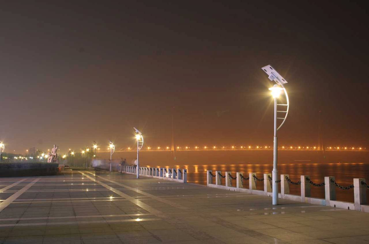 Éclairage autonome de quais réalisé par des lampadaires solaires IMEX CGI